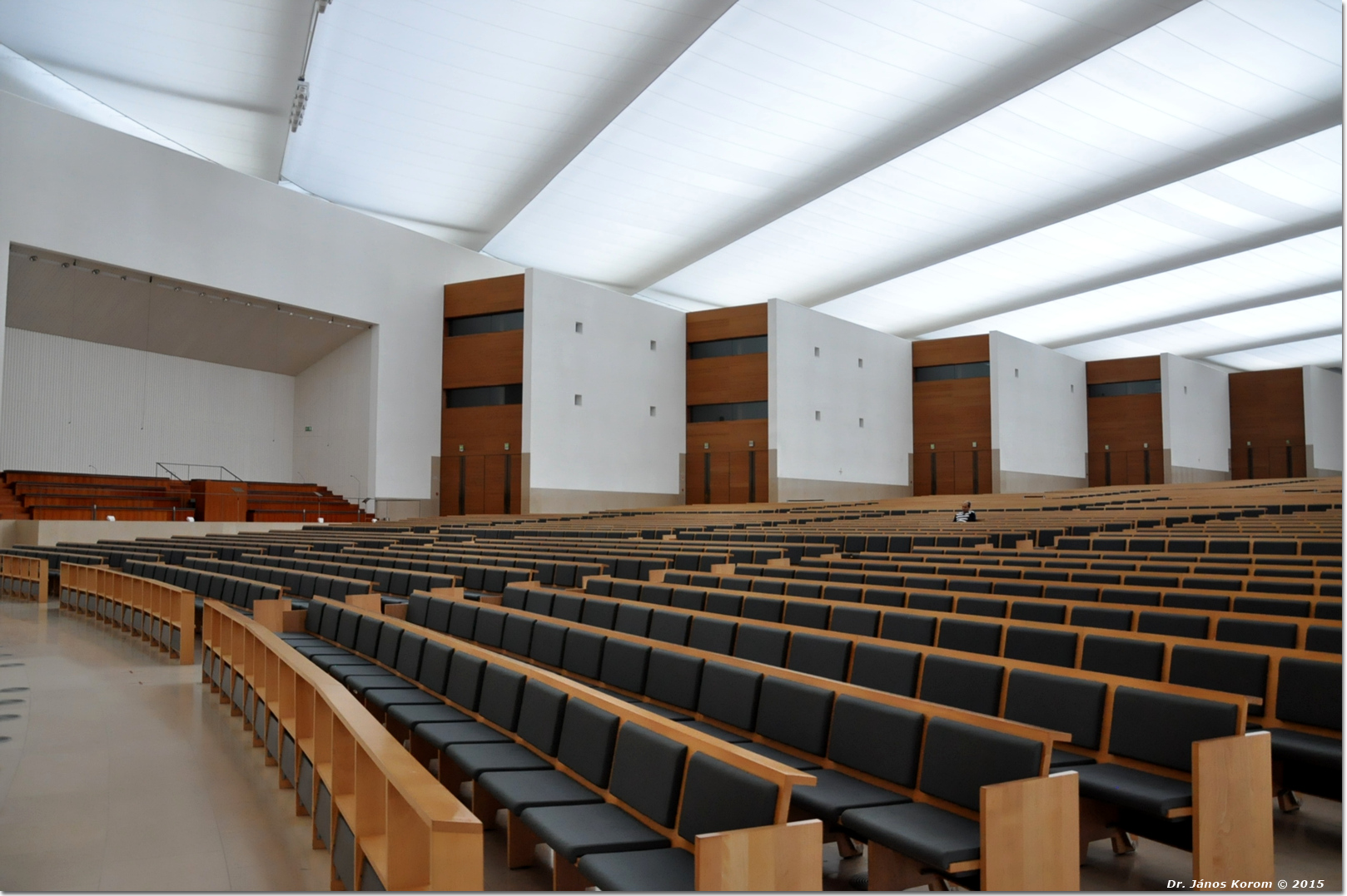 Igreja da Santissima Trindade - Kirche der Heiligsten Dreifaltigkeit